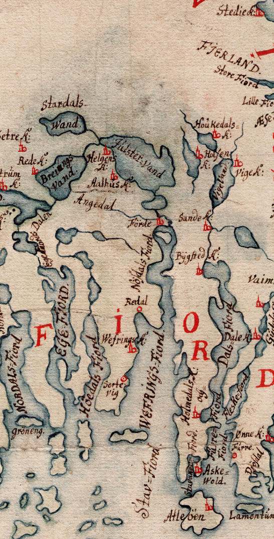 Sjøkart fra 1610 over kysten fra Karmøy til Geirangerfjorden. Håndtegnet i ukjent målestokk. Original kartstørrelse ca 74 cm x 31 cm. Et eksemplar befinner seg hos Statens kartverk Sjø i Stavanger.